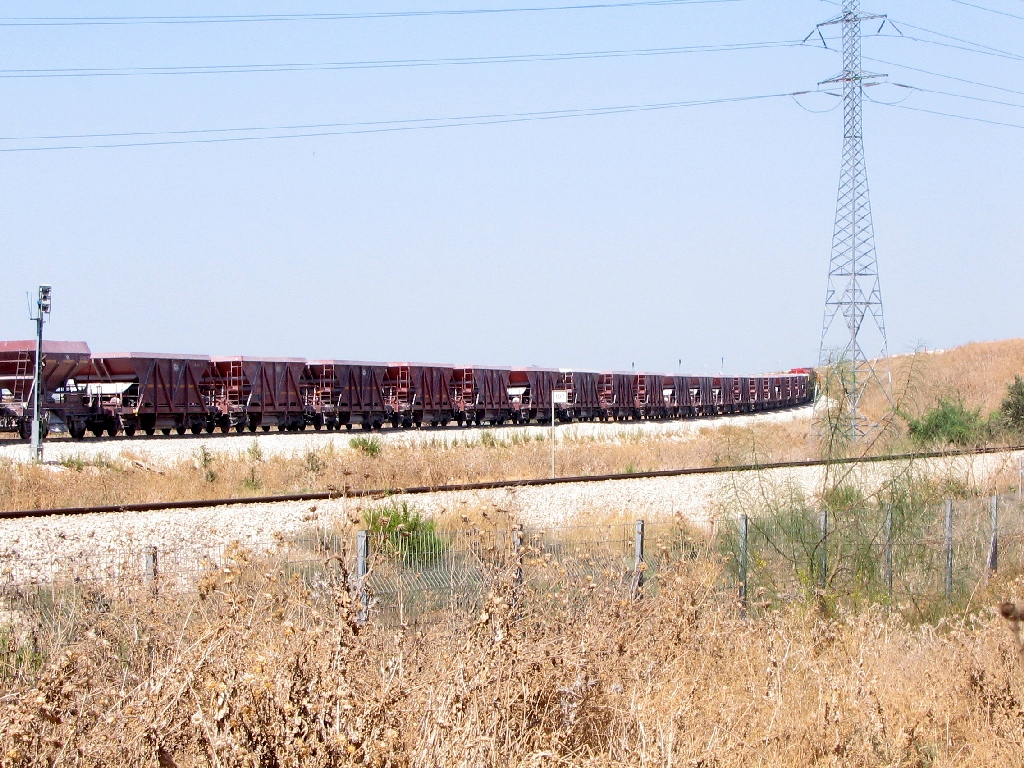 קרונות משא לפיזור רבד של רכבת ישראל